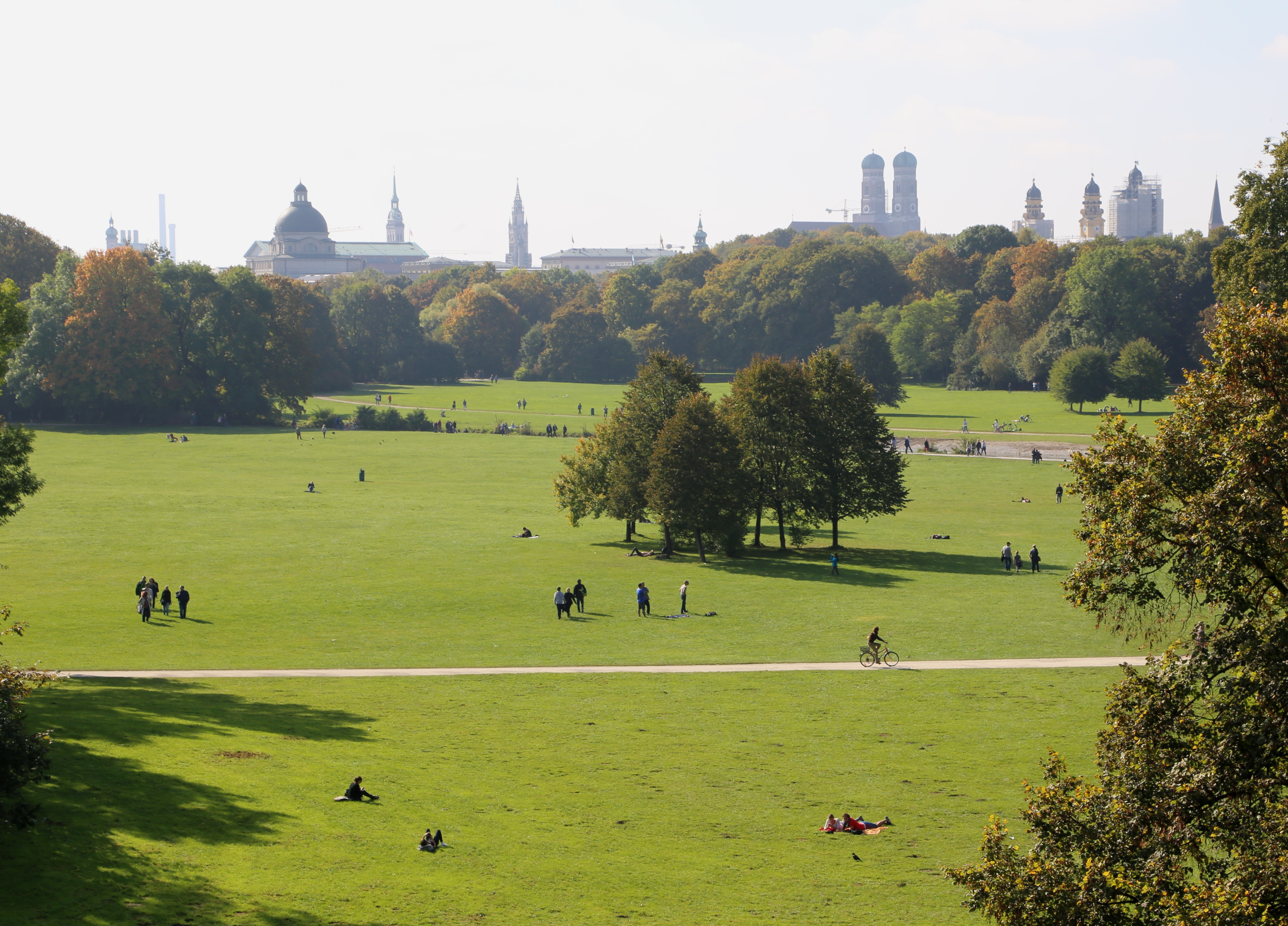 Blick vom Monopteros auf den Englischen Garten, München